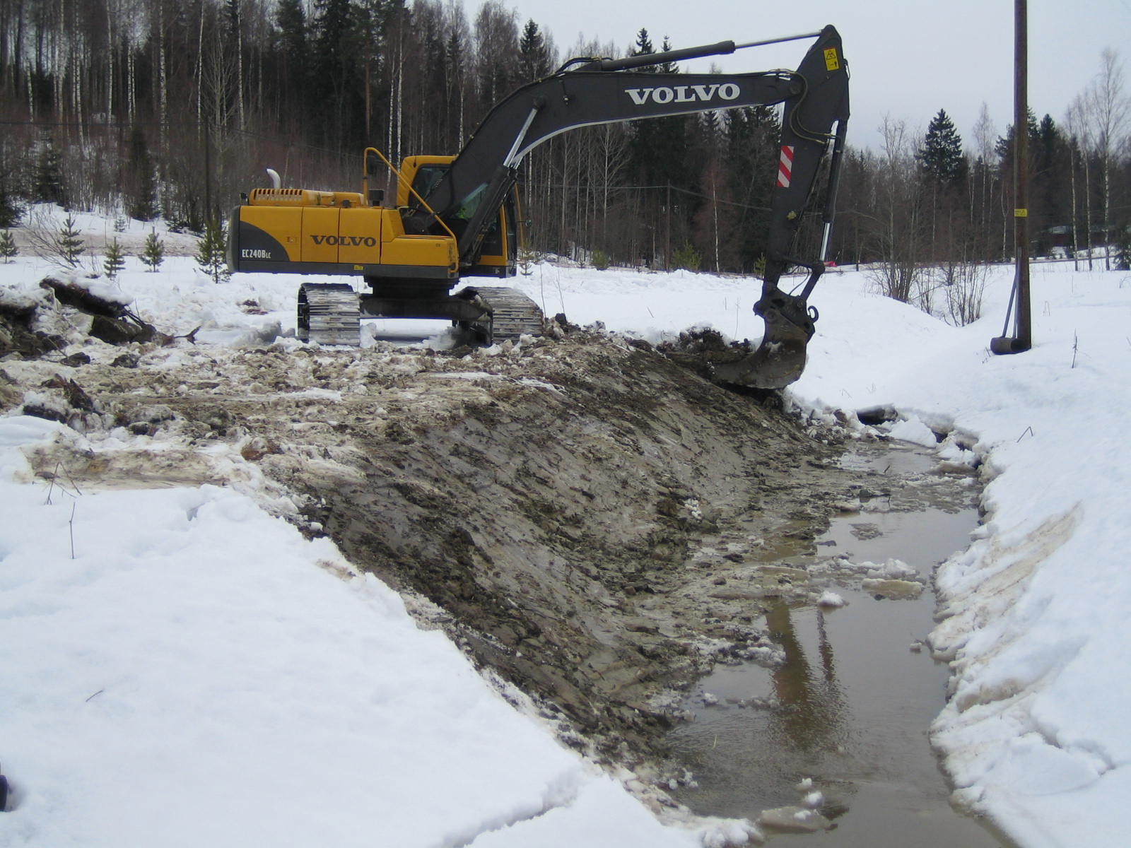 Ritobäckenin kunnostus